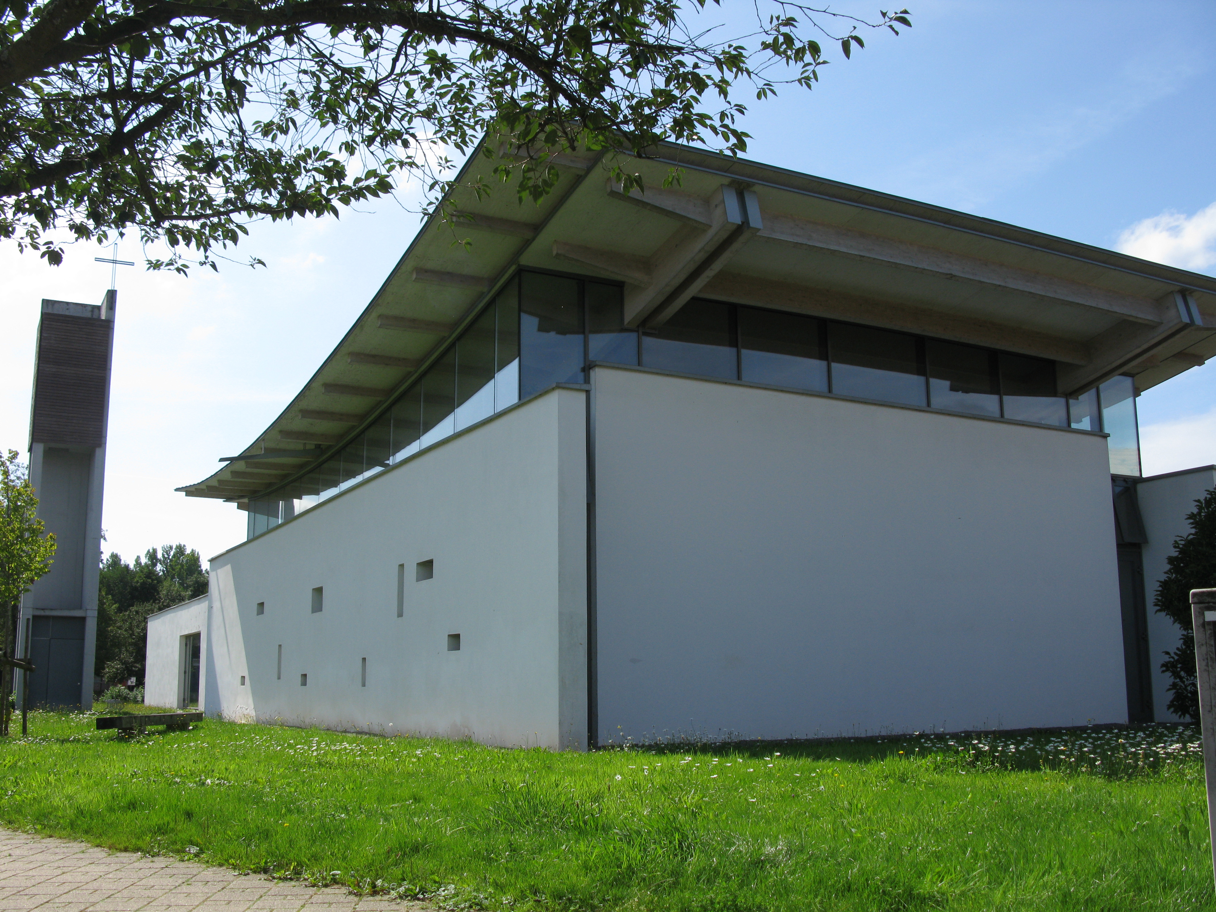 Kath. Kirche St. Maximilian Kolbe in Vörstetten